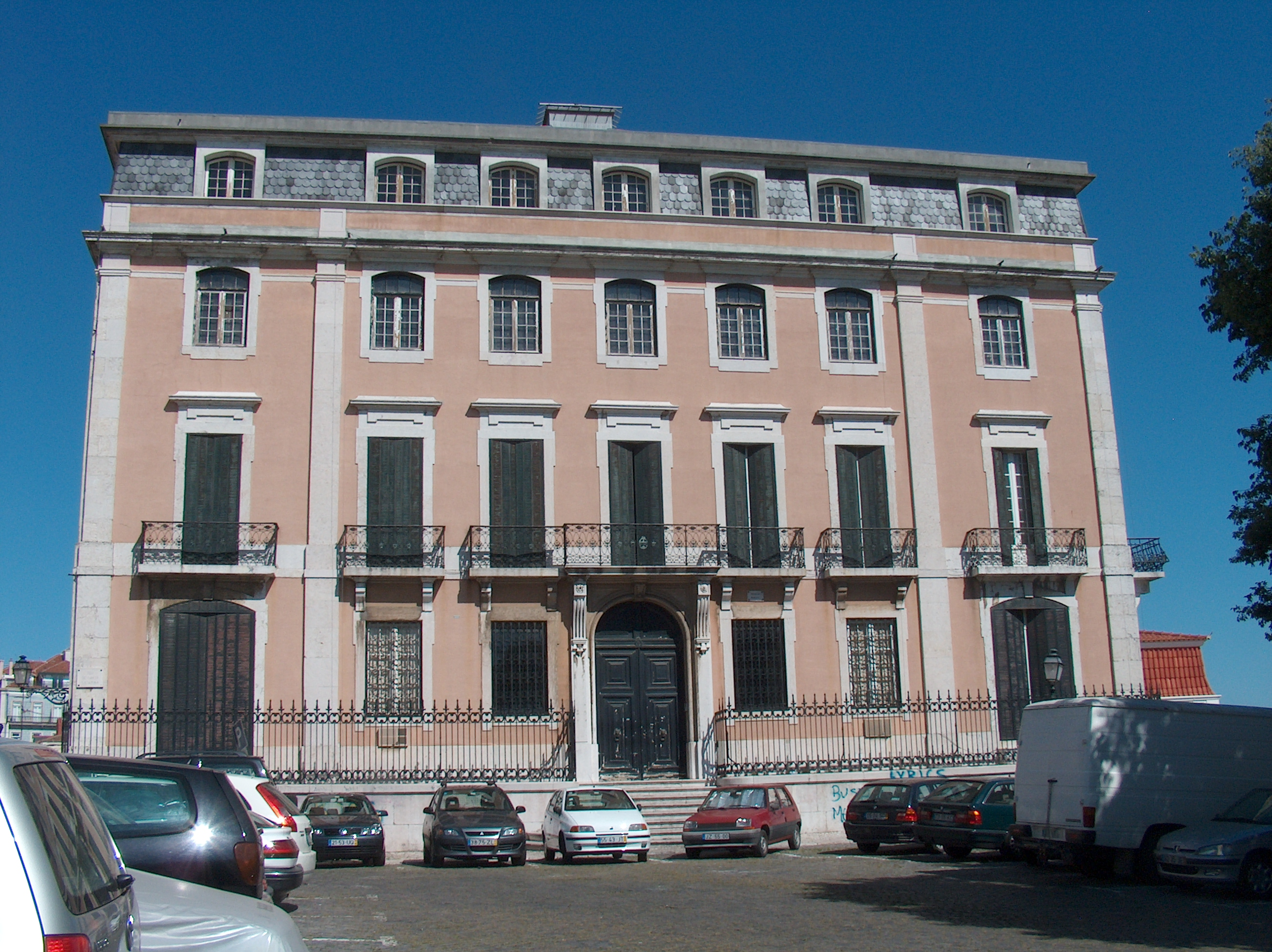 Palácio oitocentista, Lisboa, Portugal.